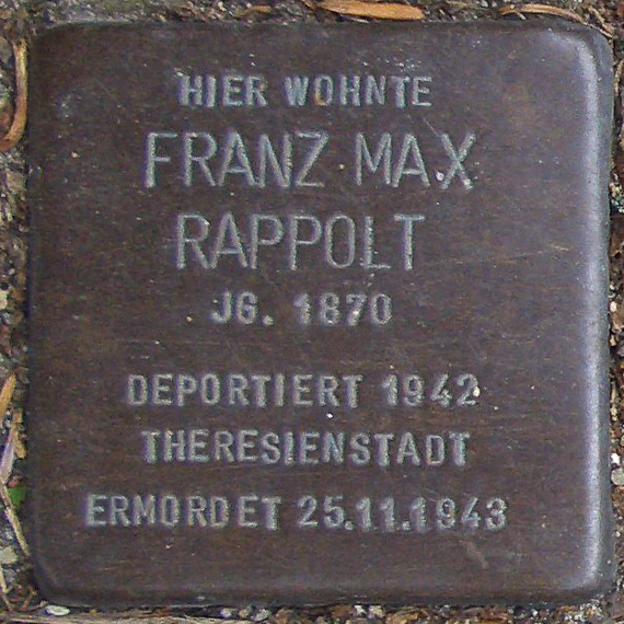 Stolperstein für Franz Max Rappolt vor dem Gebäude Leinpfad 58 in Hamburg-Winterhude.